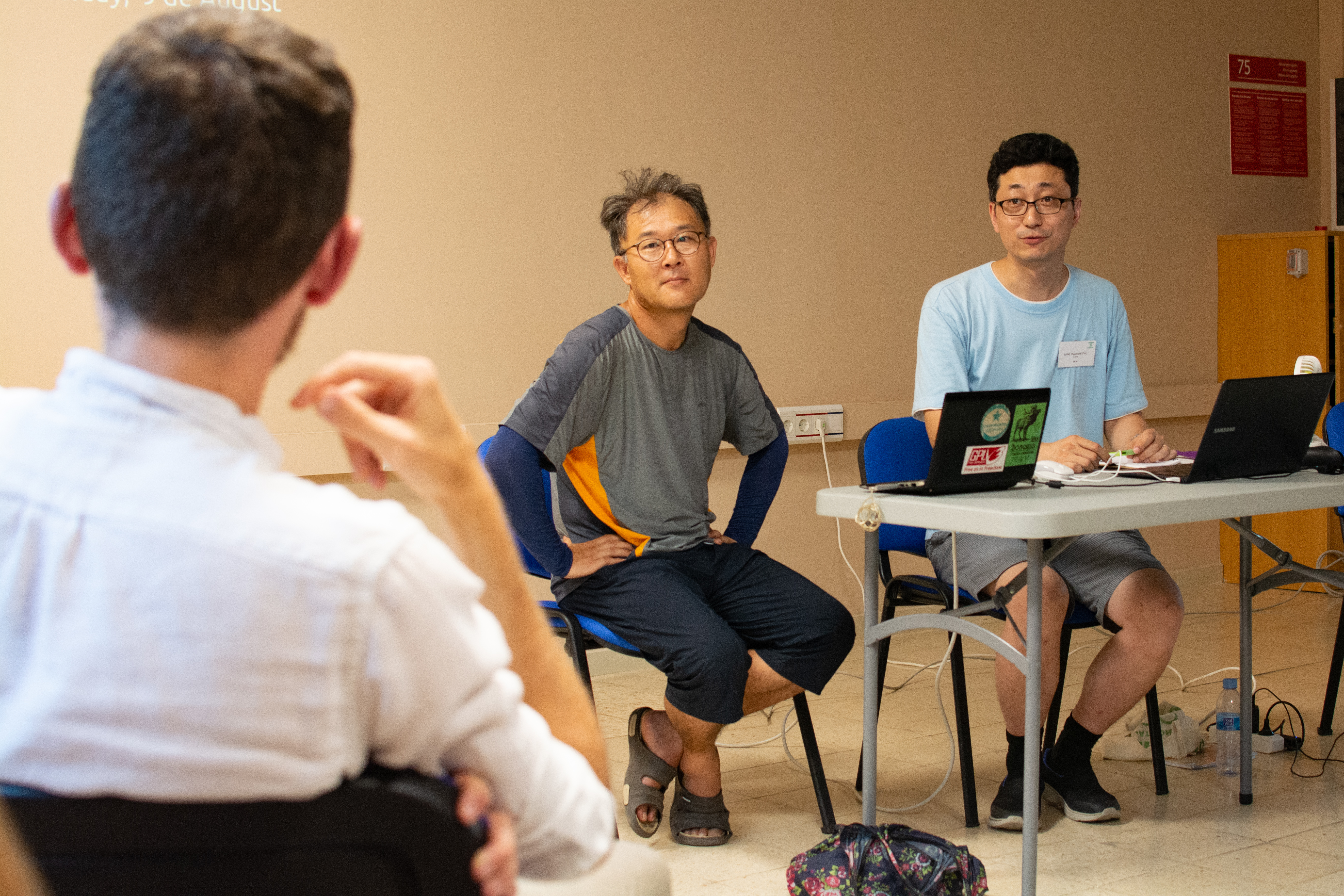 Polemika parolado de Sonĝo kaj Paz pri Nord-Koreio